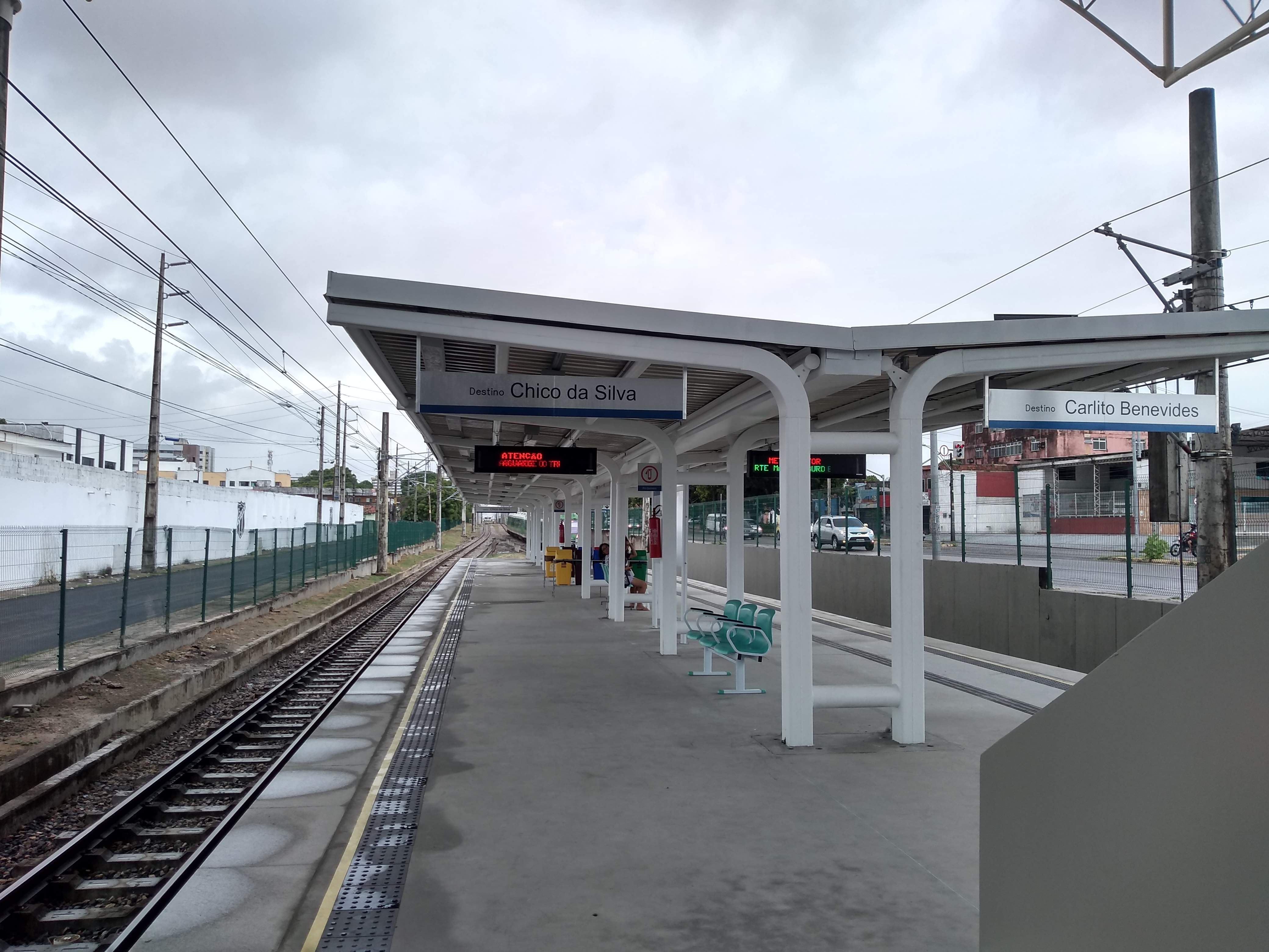 Trecho da Plataforma da Estação Padre Cícero, ultima estação a ser entregue da Linha Sul do Metrô de Fortaleza em Dezembro de 2019.